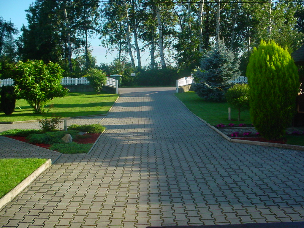 Mezgovci ob Pesnici 64/a